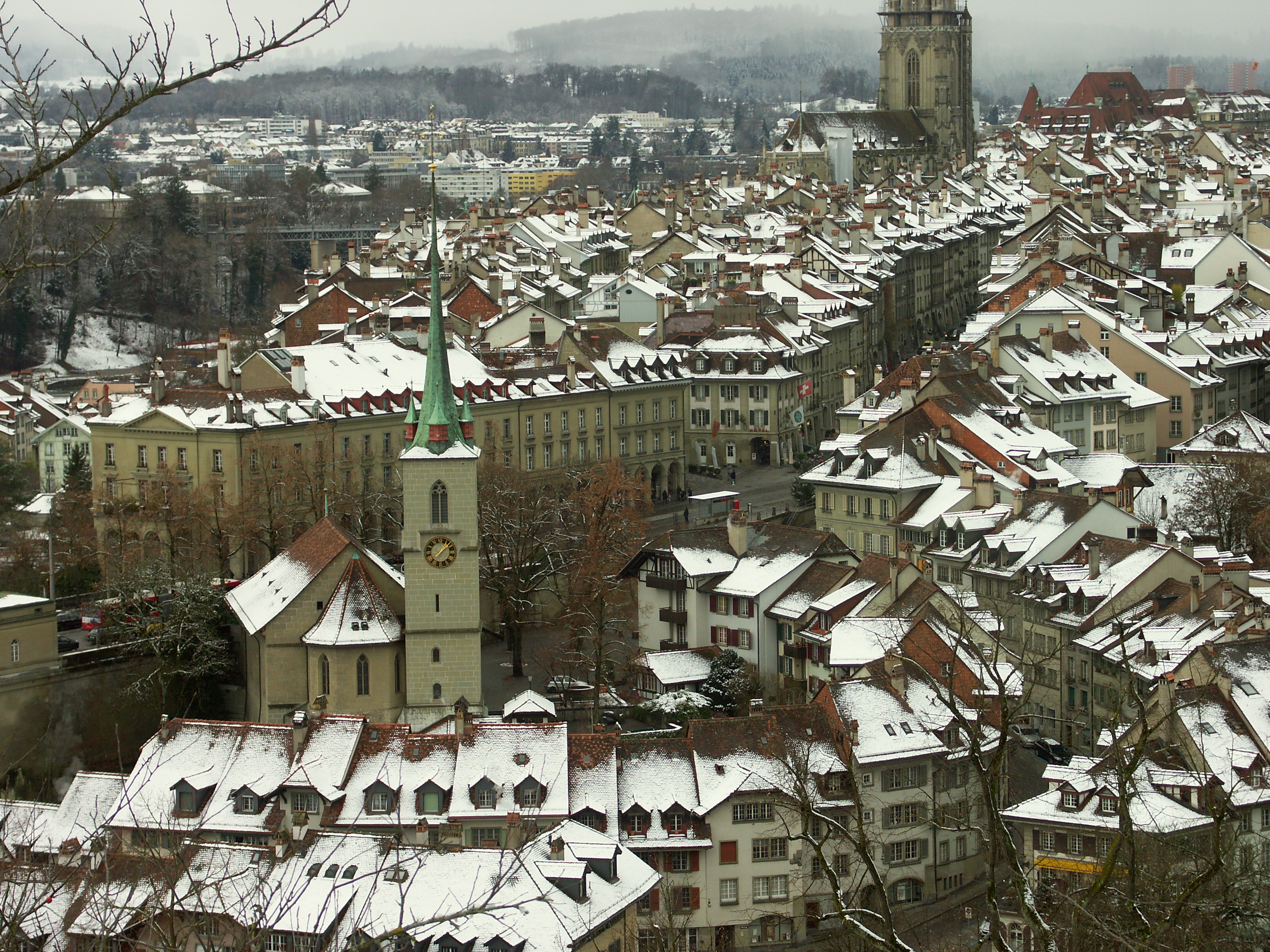 Bern in Winter. Blick aus Rosengarten